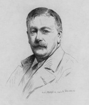 French painter Antoine Guillemet (1841-1918)